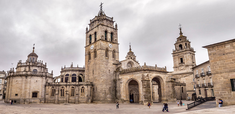 Panorámica de la Catedral de Santa María en la ciudad de Lugo.